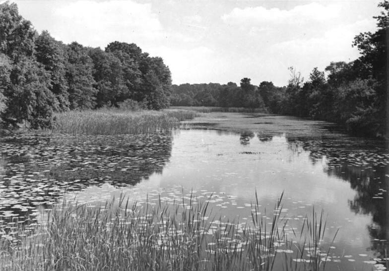 Naturschutzgebiet Kreuzhorst, Waldsee Zentralbild Rösener Str-Qu 17.8.1953 Schöne deutsche Heimat Der Waldsee im Naturschutzgebiet Kreuzhorst bei Magdeburg zwischen Pechau-Prester und Kahlenberg. Information added by Wikimedia users.Anmerkung: Das Naturschutzgebiet „Kreuzhorst“ wurde erst 1961 ausgewiesen.